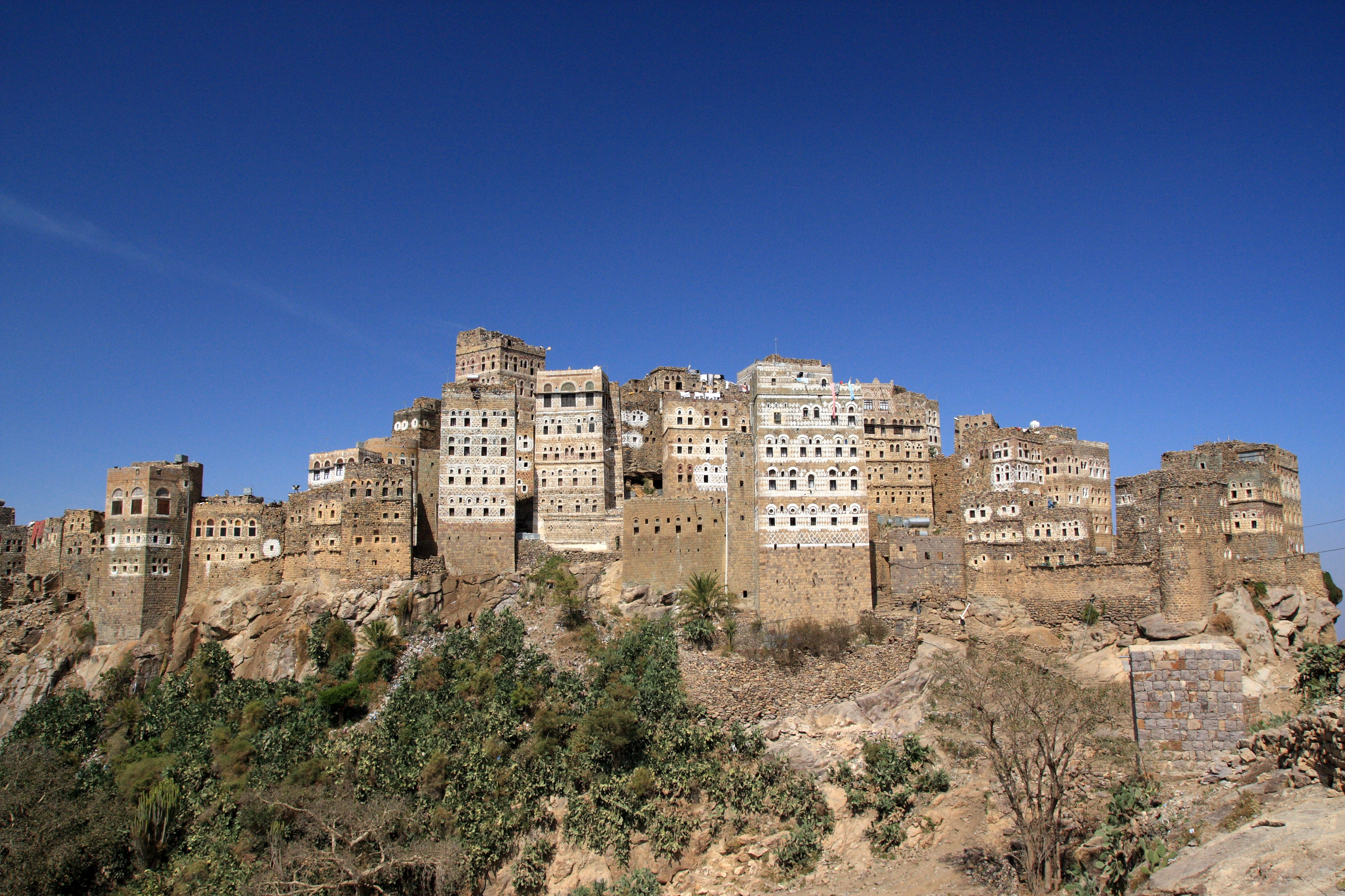 Al Hajjarah